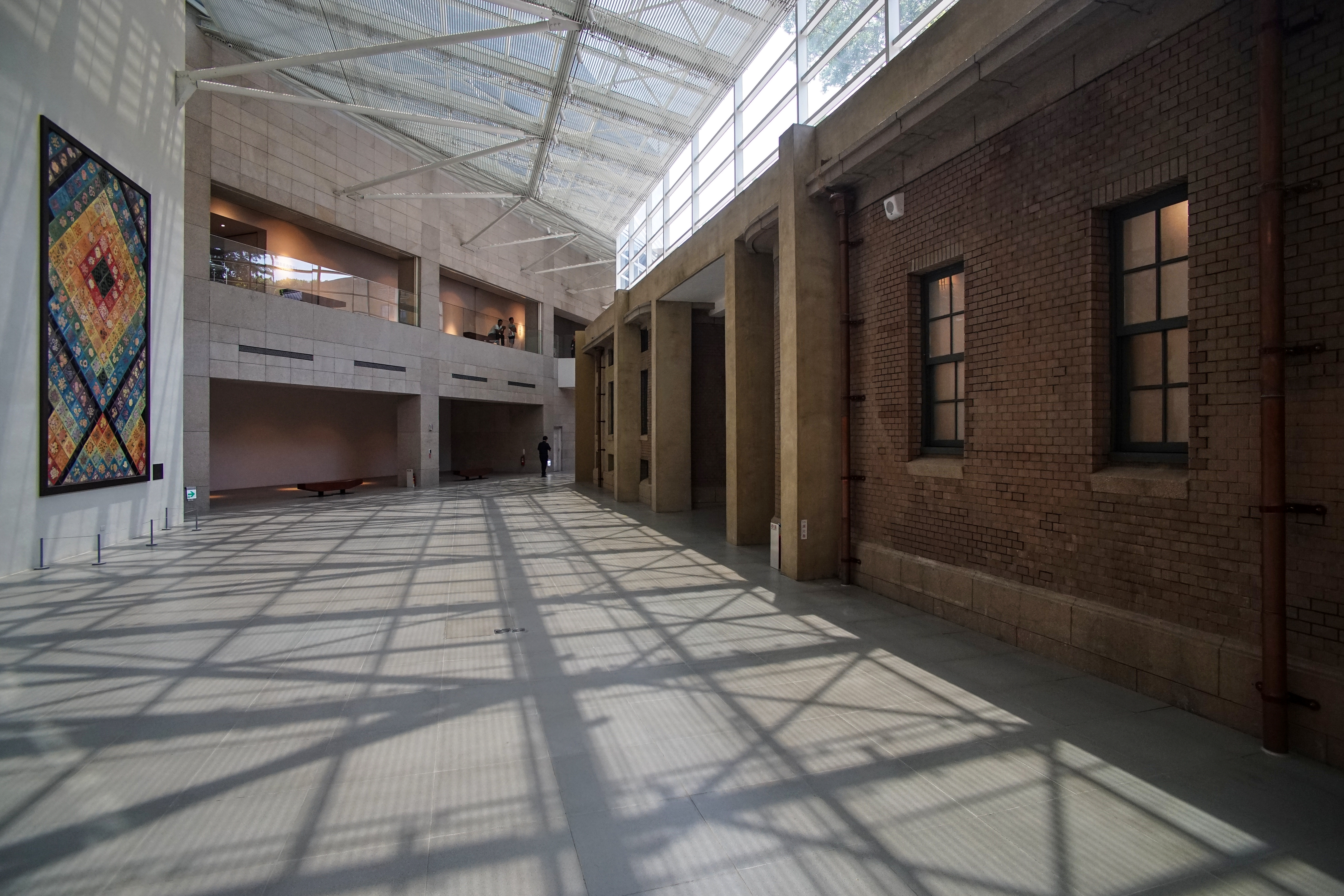 原台南警察署, 現臺南市美術館1館